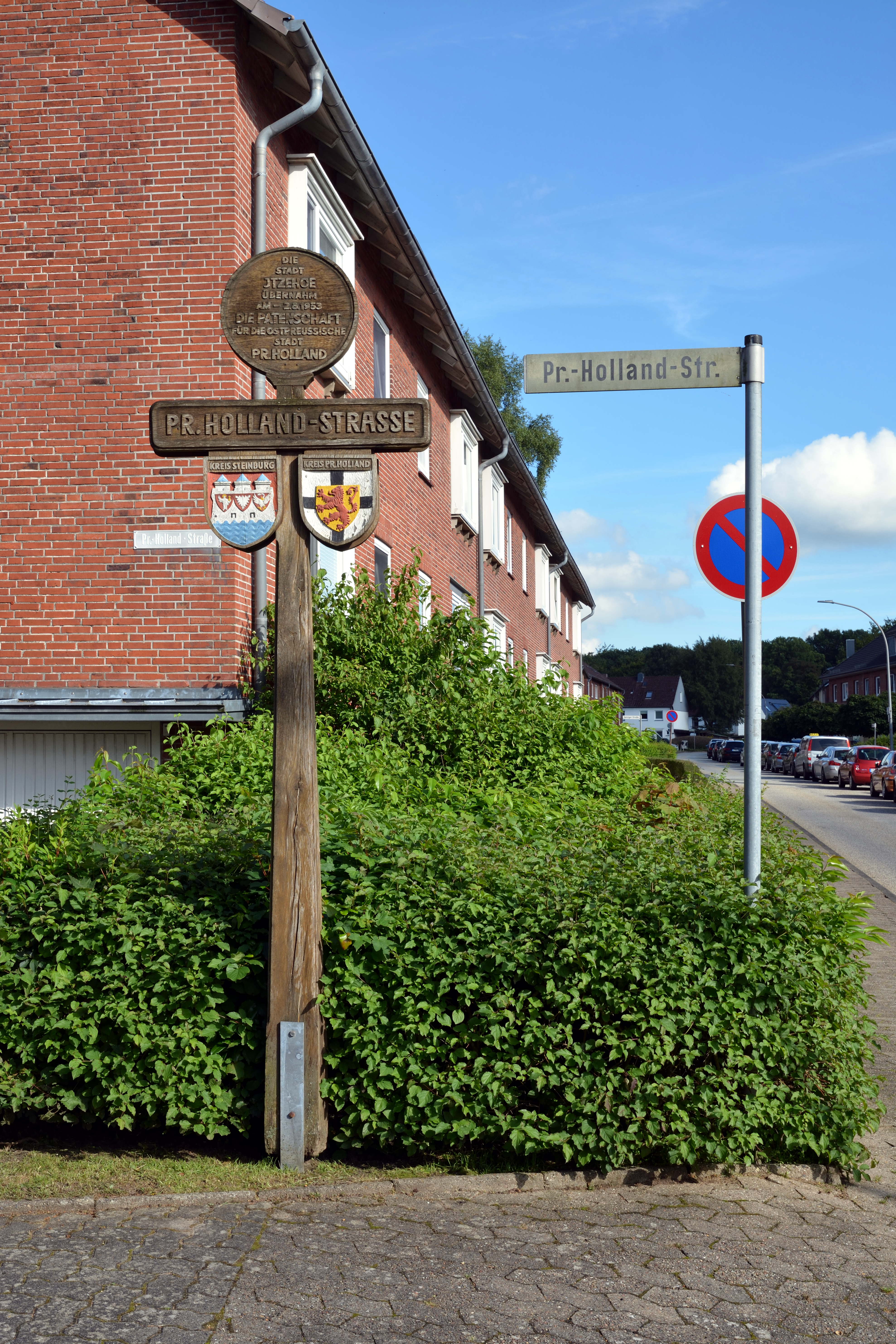 Straßenschild Preußisch-Holland-Straße /Ecke Stettiner Straße, August 2016